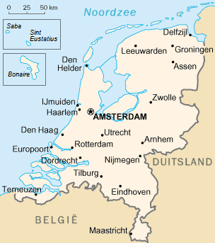 update naar aanleiding van de staatkundige hervormingen binnen het Koninkrijk der Nederlanden van oude kaart van Nederland, afkomstig uit het CIA World Factbook.